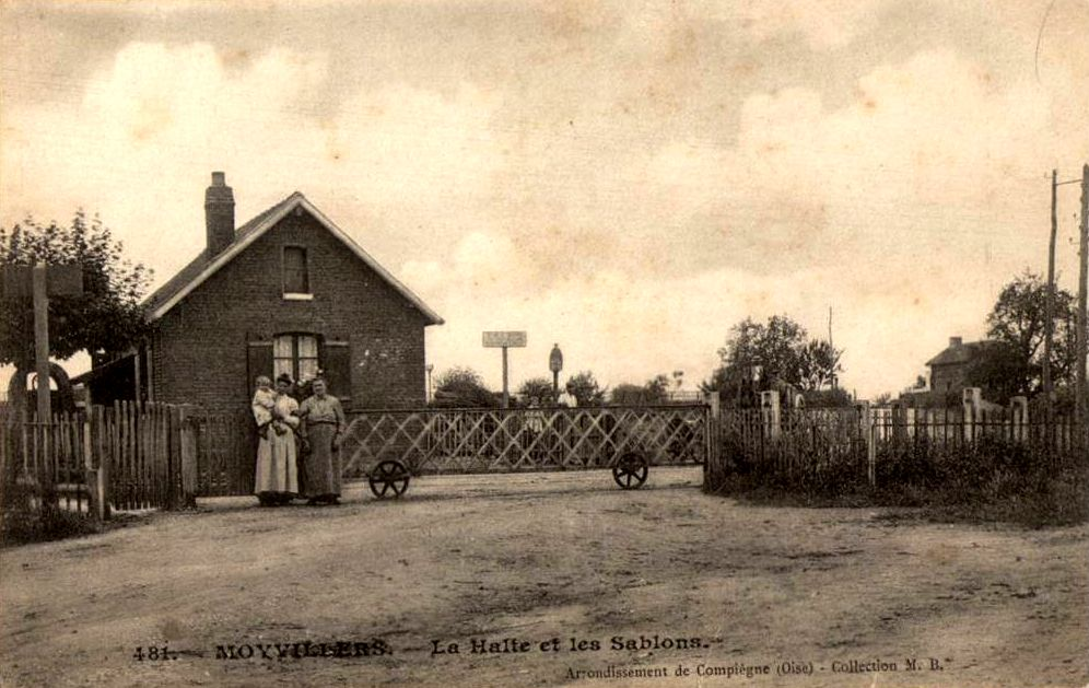 Le point d'arrêt et le passage à niveau de Moyvillers, au quartier des Sablons et à côté du bourg d'Estrées-Saint-Denis ; la légende de la photo est erronnée (il existait aussi la halte d'Arsy - Moyvillers et le point d'arrêt de Moyvillers).